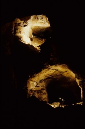 Hauptgang mit überlagerndem Ricardo Da Vinci Gang, Kolkbläser-Monsterhöhle, Steinernes Meer